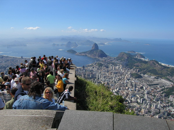 Brasil, Rio de Janeiro, Blick vom Corcovado